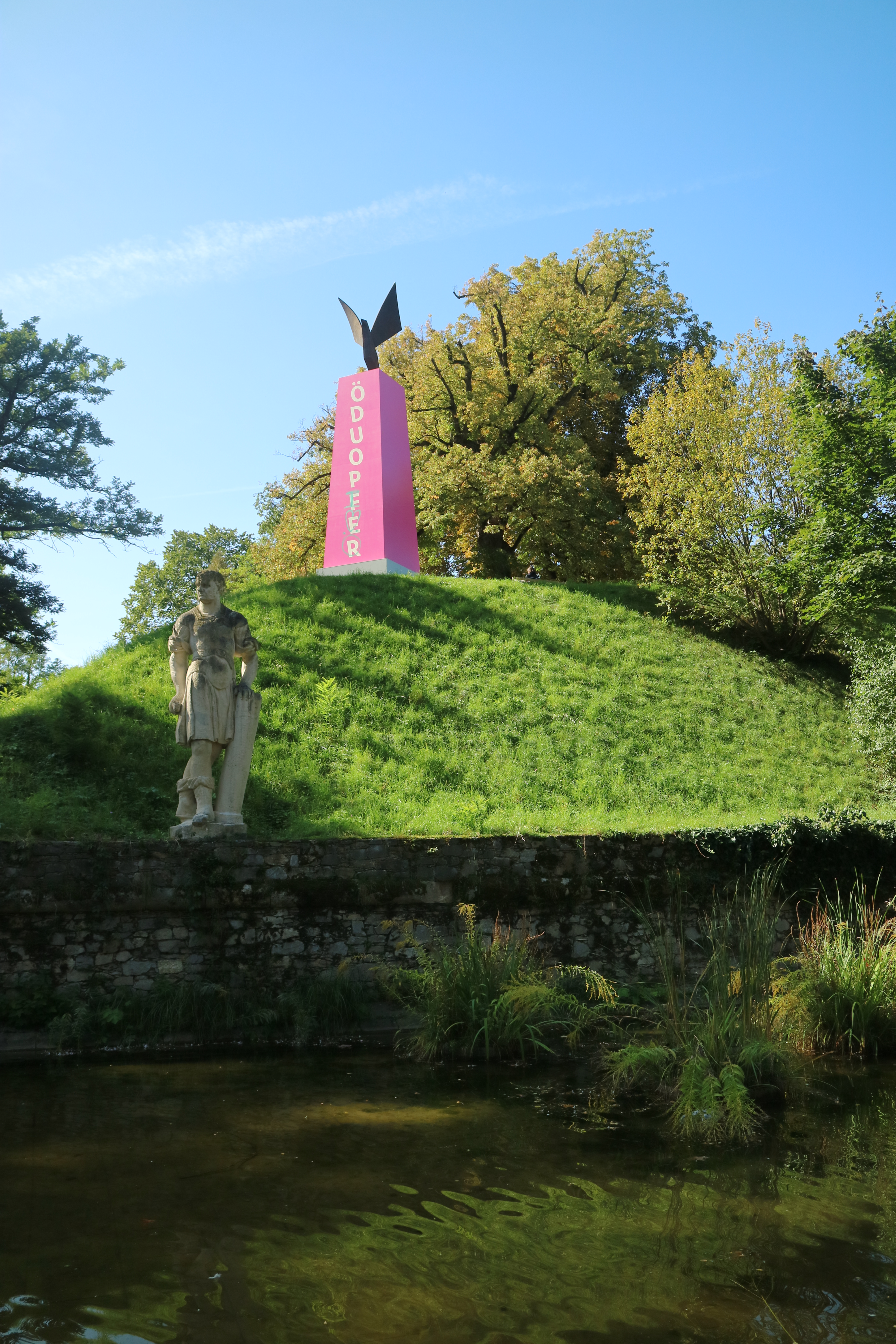 Eduard Freudmann: Monumyth (2019), Kunstinstallation am Grazer Freiheitsdenkmal (Adler-Befreiungsdenkmal) anlässlich des steirischen herbst 2019, die sich kritisch mit dem Opfermythos Österreichs auseinandersetzt